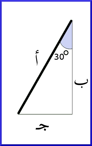 توضيح لمركبات الضلع أ في المكعب عند دورانه -2